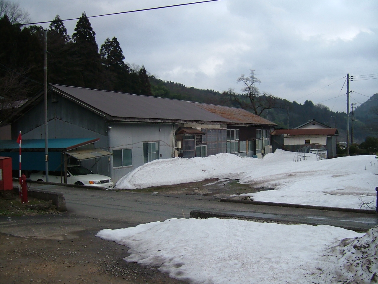 鳥取市立神戸小学校岩坪分校跡